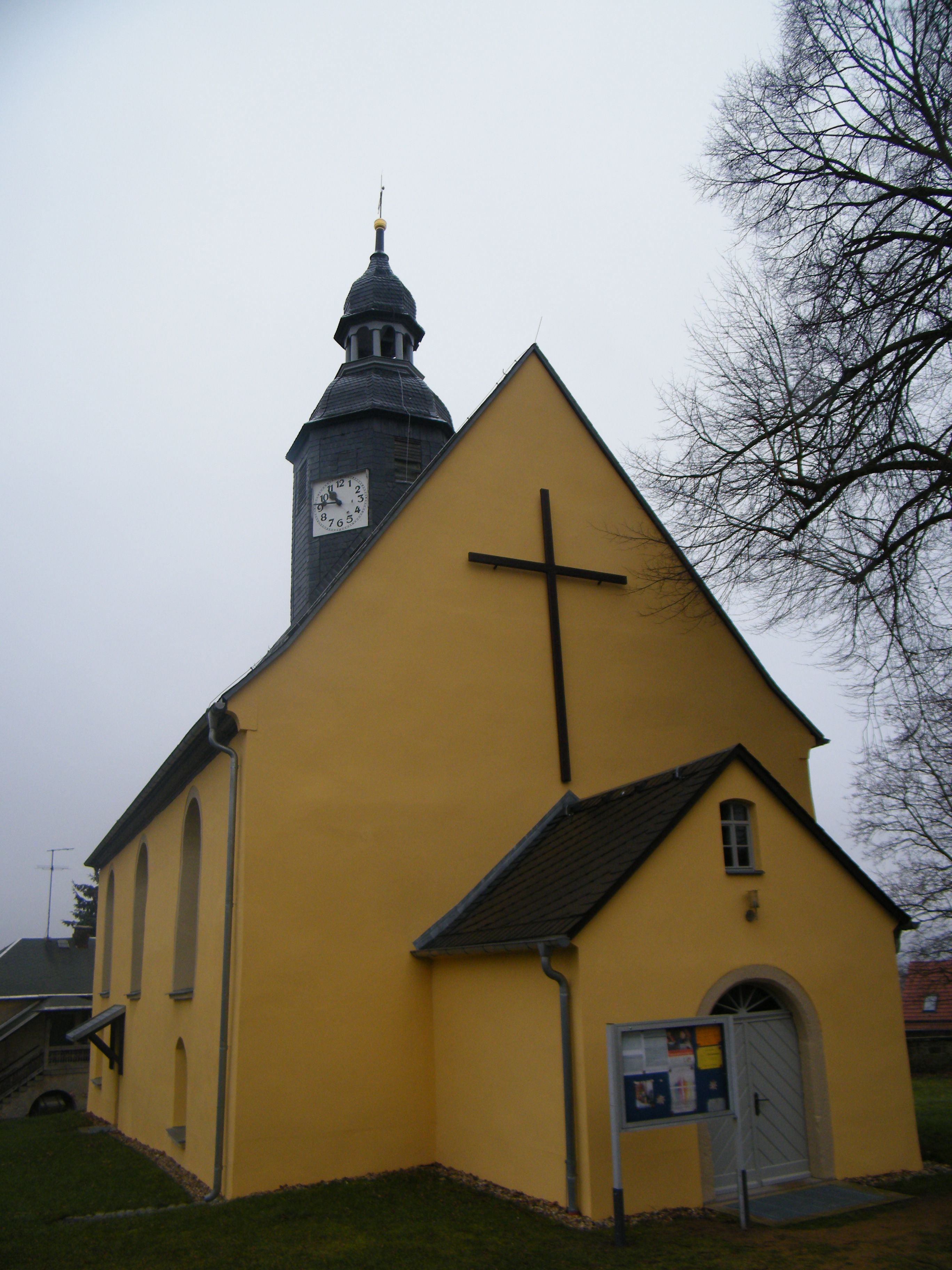 Vesnický kostel v Lichtenhainu po celkové rekonstrukci, 2018